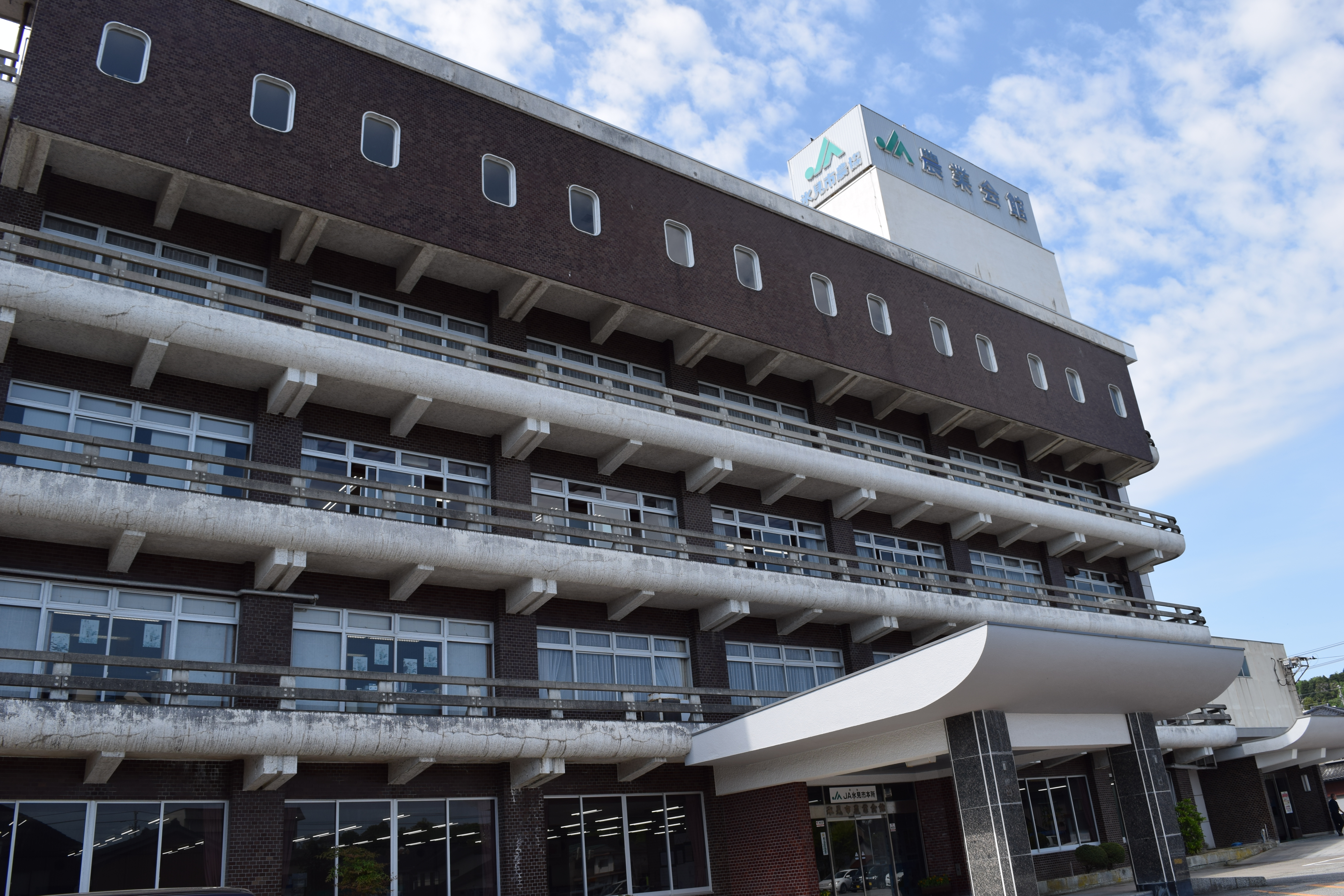 氷見市農業協同組合